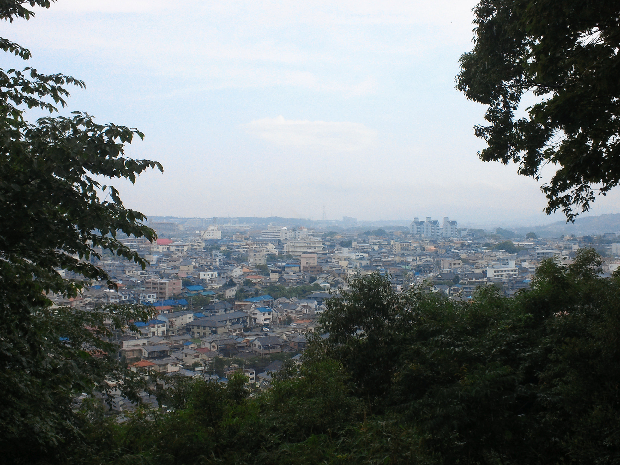 烏帽子形公園展望台からの眺め